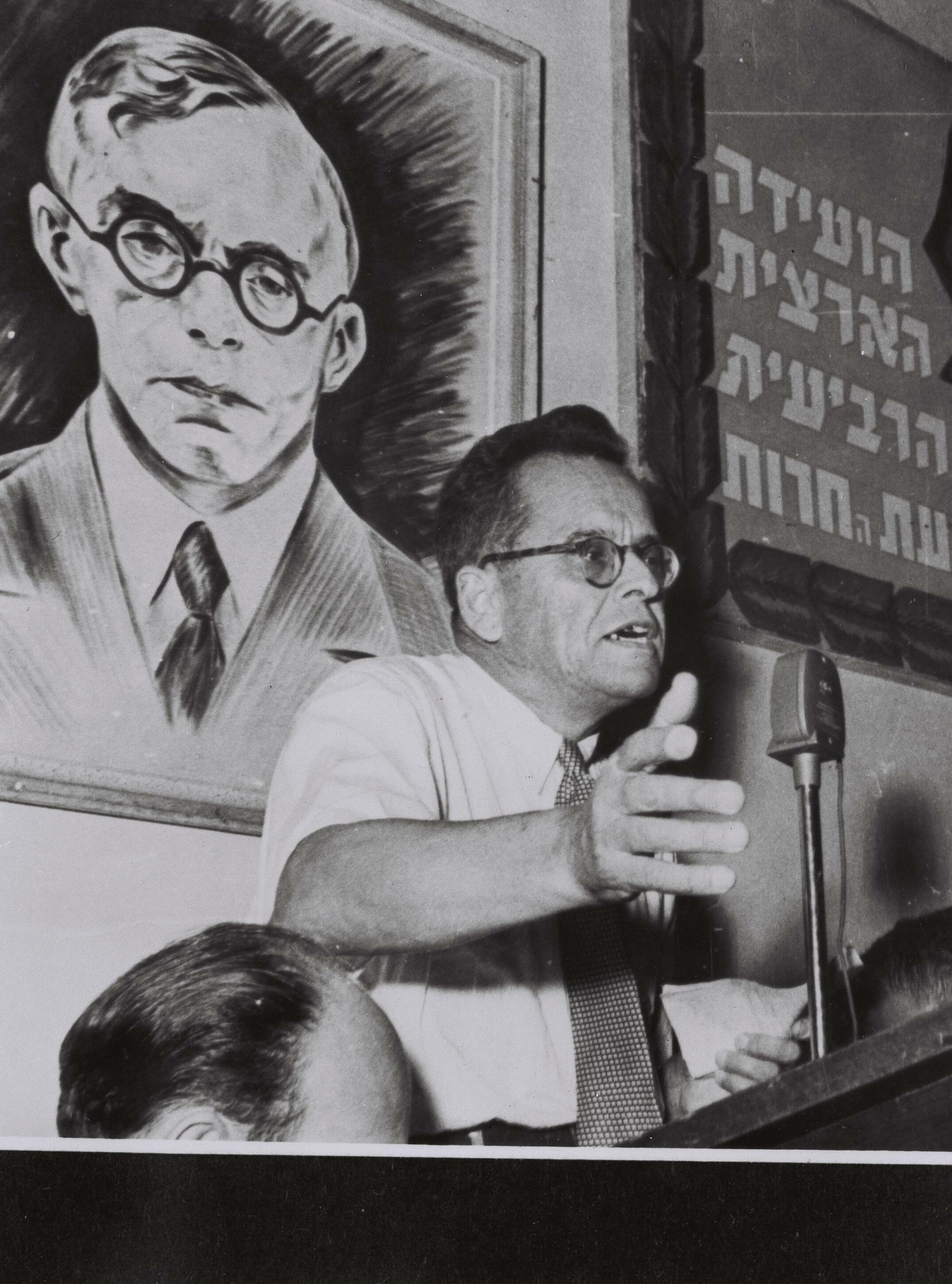 אבא אחימאיר נושא דברים בוועידה הארצית הרביעית של תנועת חרות